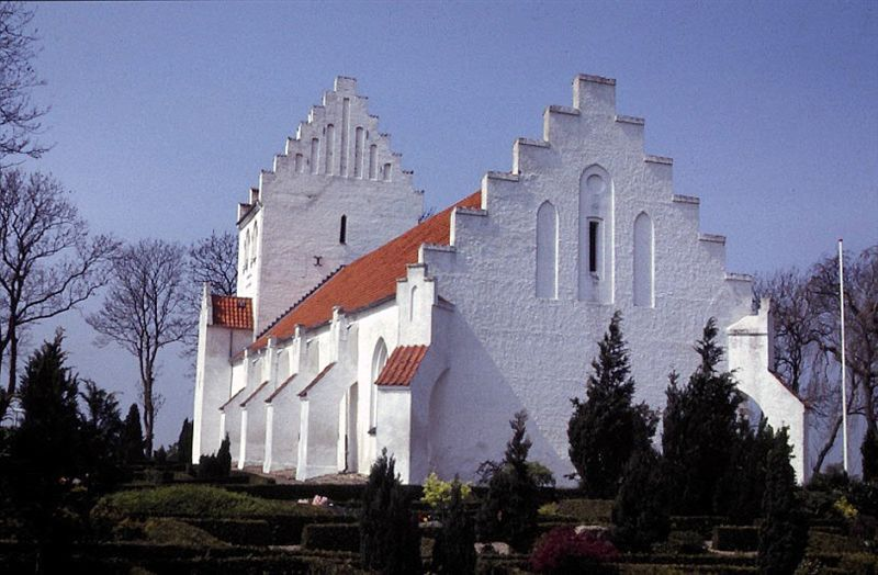 Egense Kirke i Danmark. Egense kirke